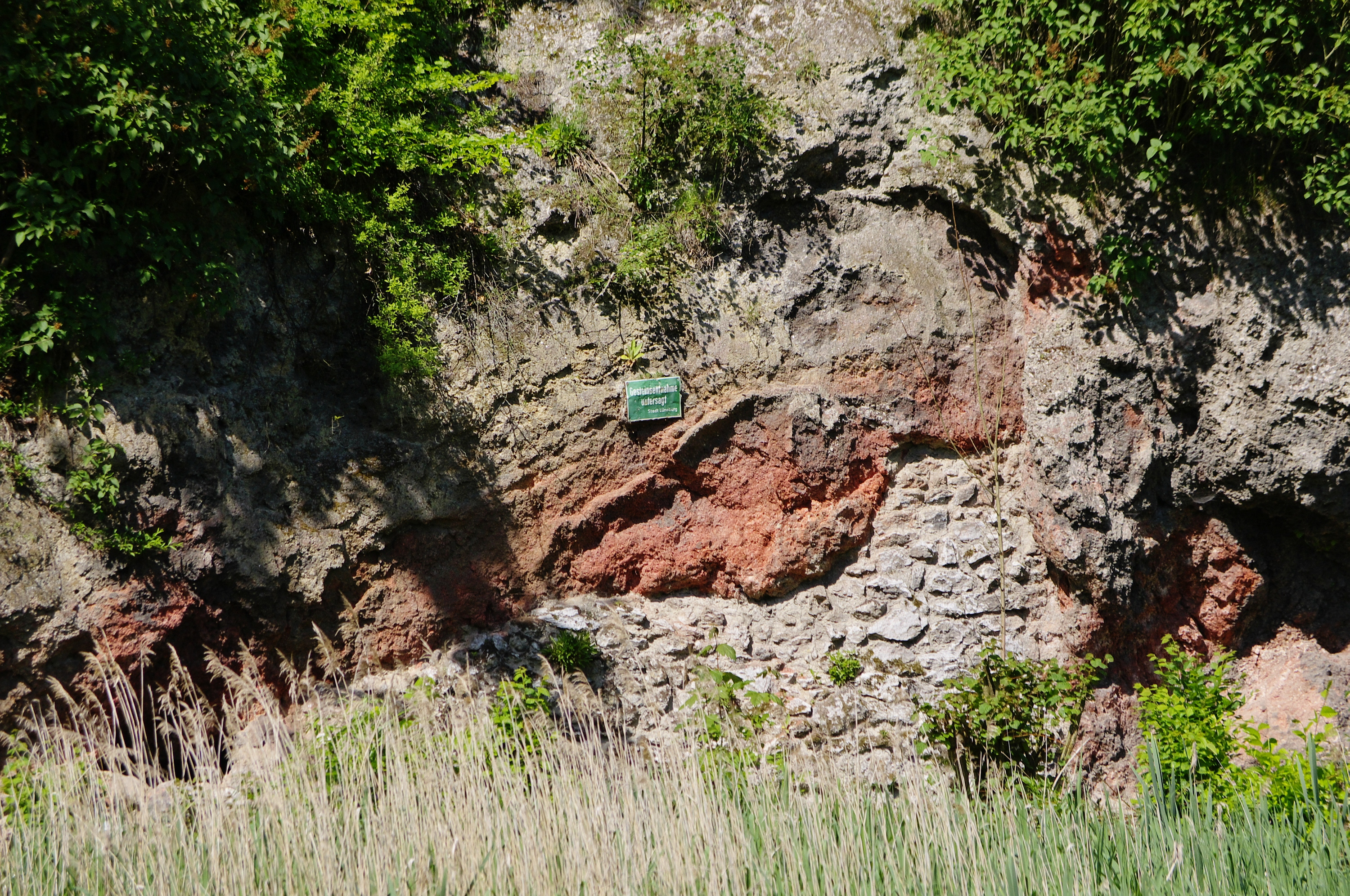 Lüneburg, Kalkberg, Gesteinsentnahme untersagt